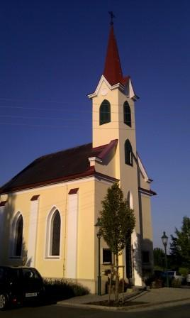 Ortskapelle Krumegg